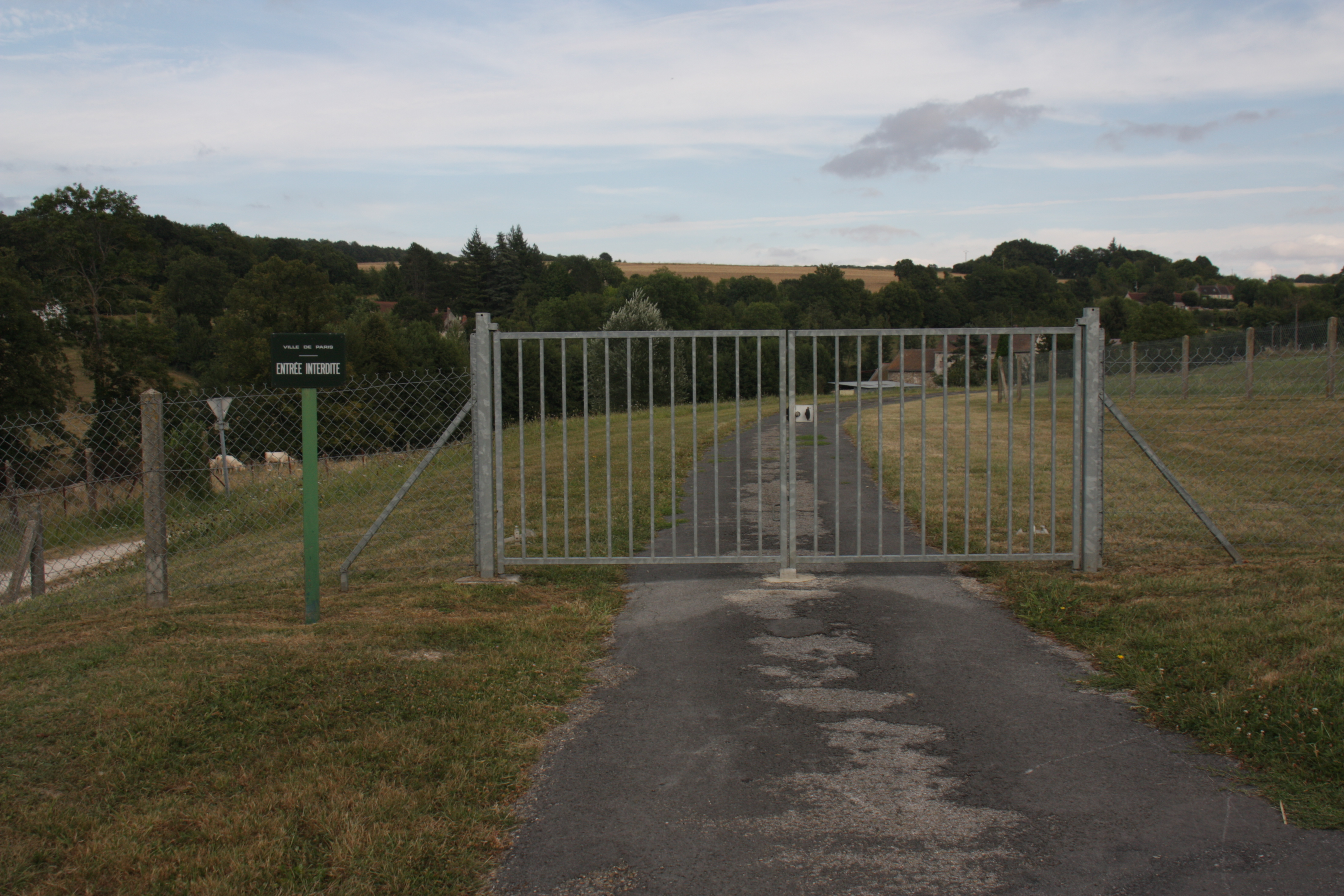 Entrée des sources de la Dhuis, à Pargny-la-Dhuys, dans l'Aisne.